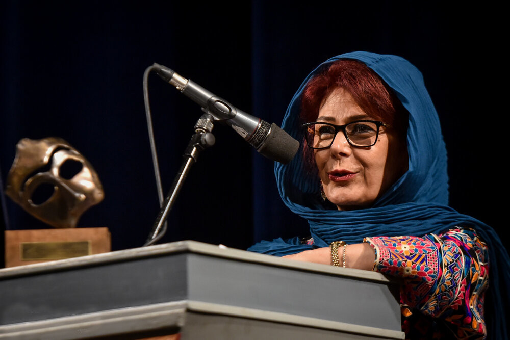 آیین نکوداشت ادنا زینلیان